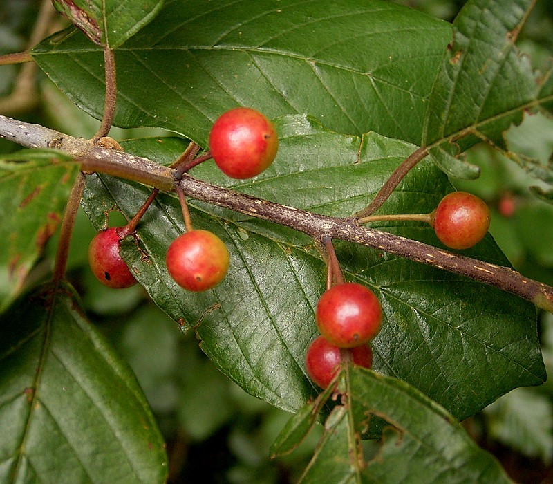 Rhamnus frangula